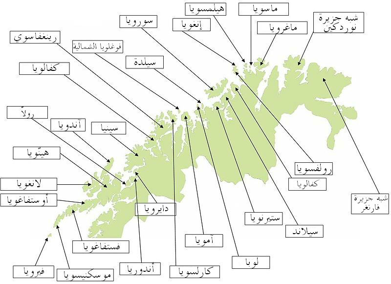 خريطة للجزر الواقعة شمال النرويج.